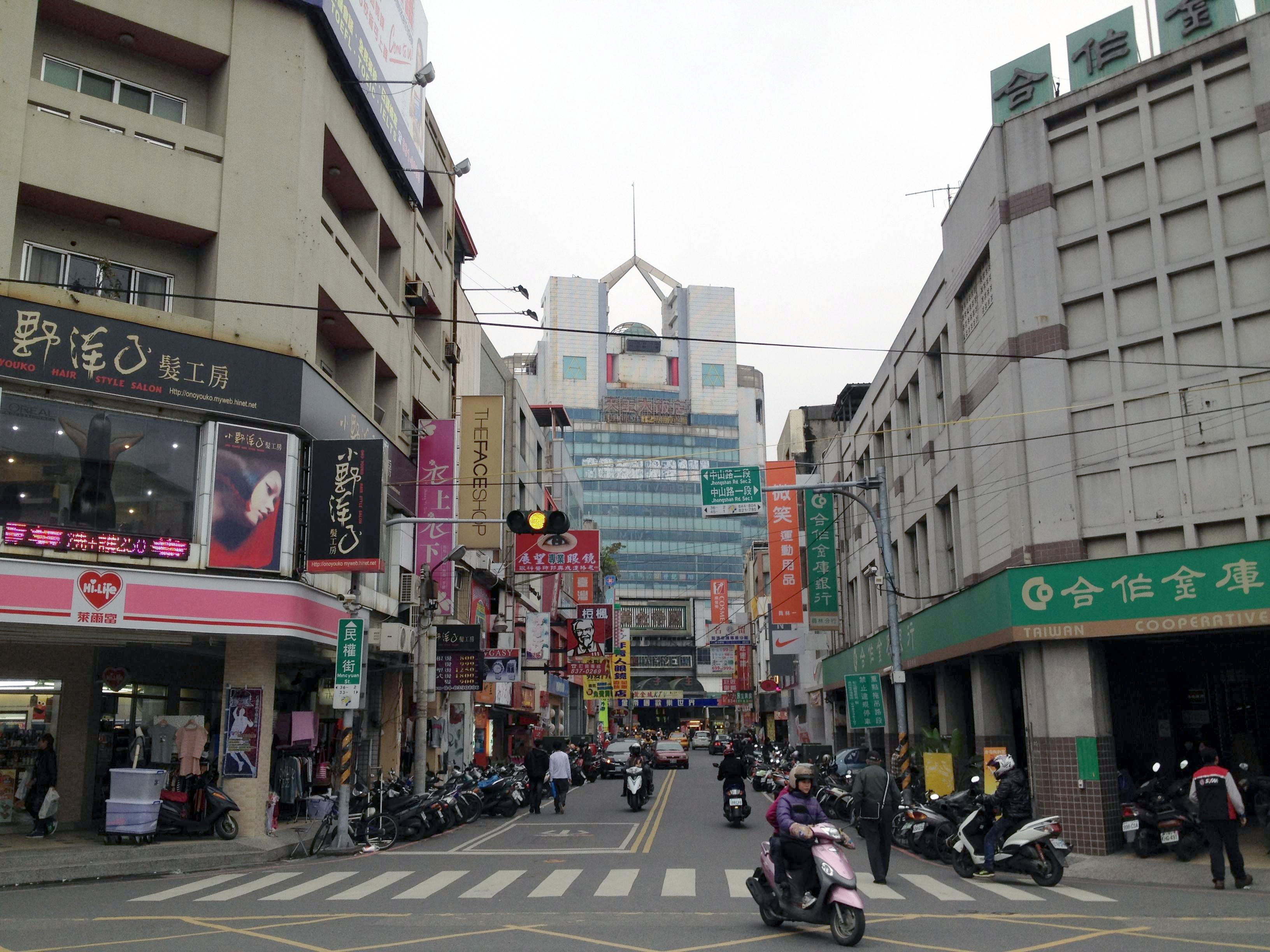 員林鎮民權街巷口。